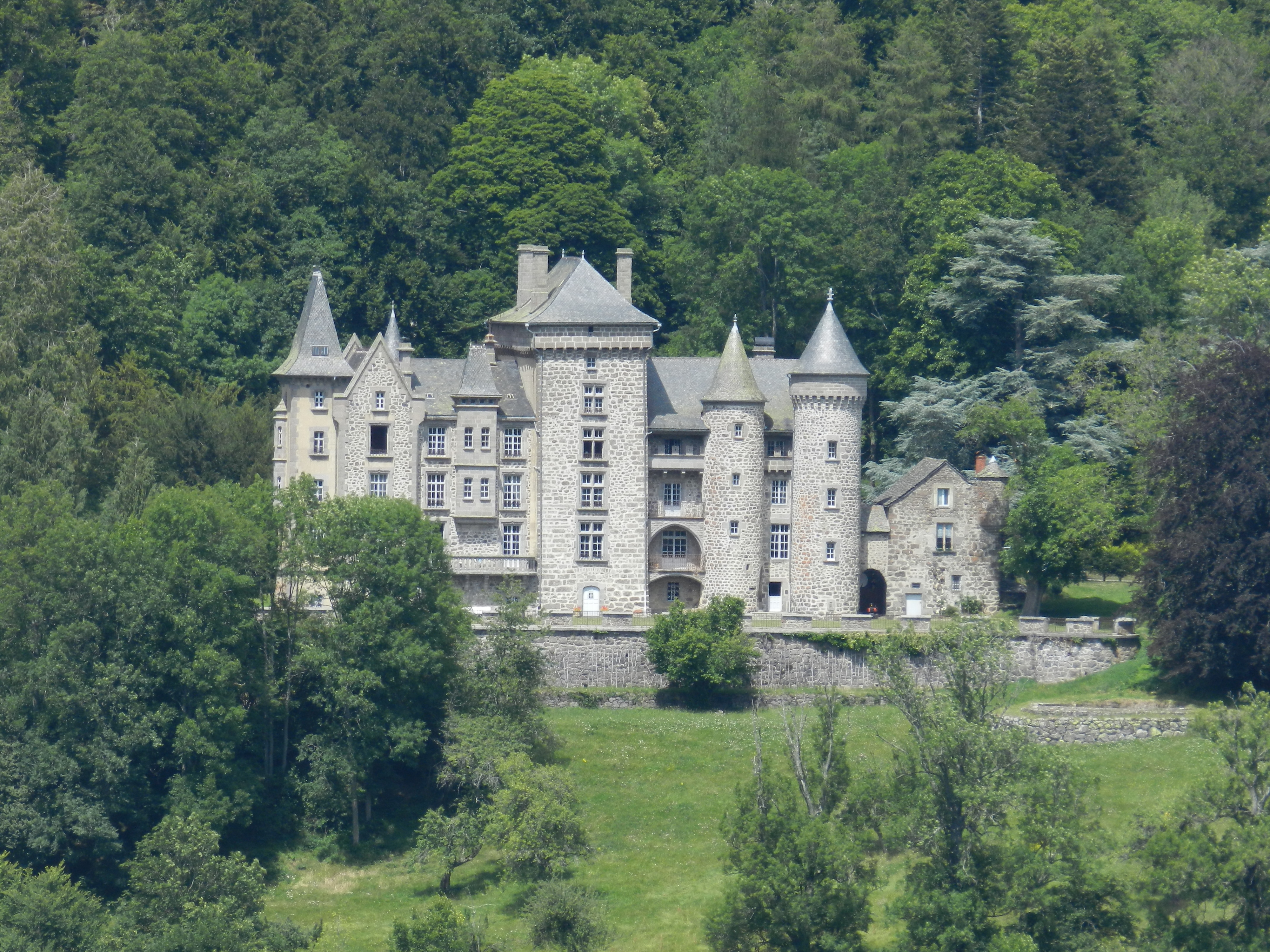 Le château d'Anterroches depuis la route allant à Grand-champ (commune de Laveissière)